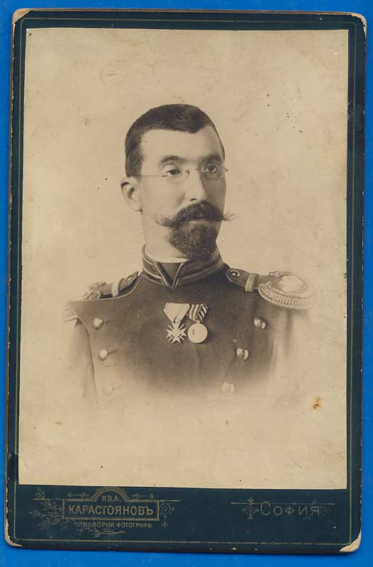 Тома Давидов.